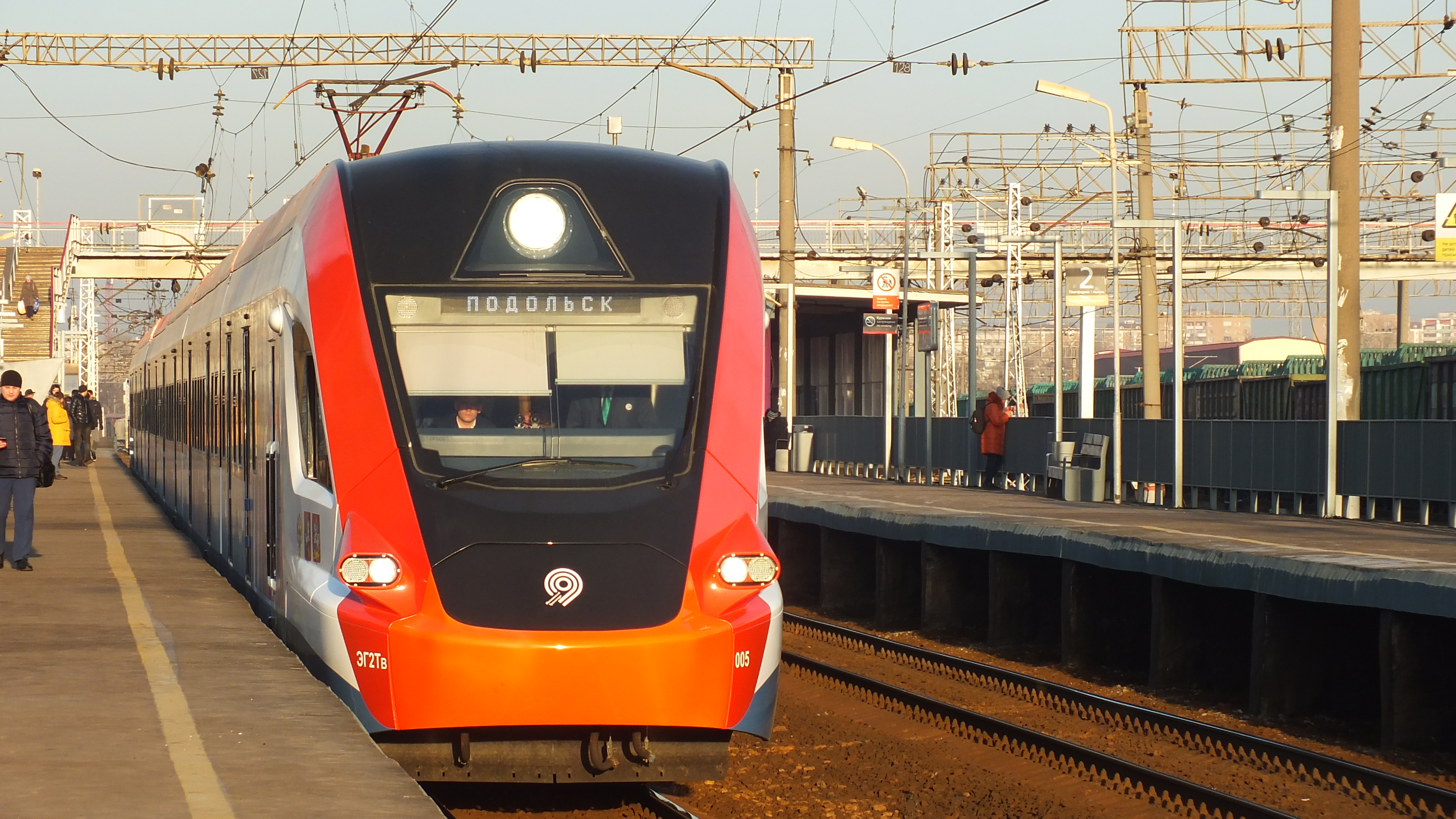 Электропоезд ЭГ2Тв «Иволга» на платформе Перерва (в сторону Подольска), на новой линии МЦД-2 Московских центральных диаметров, почти фронтальный вид. Фотография 23 ноября 2019 года при низком ноябрьском солнце.